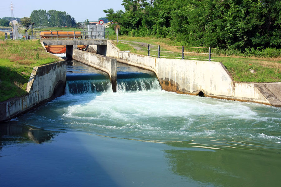 Lo sbocco del Diramatore Alto Novarese nel Canale Cavour a Recetto (NO)